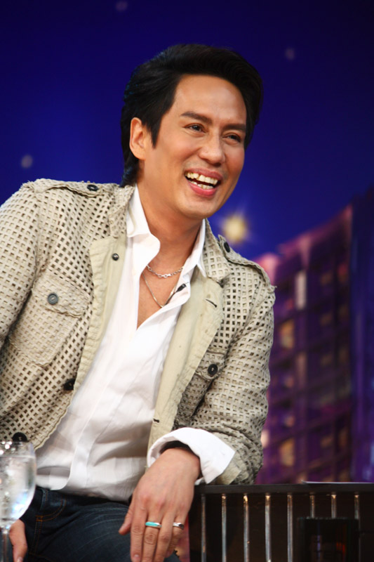 เบิร์ด ธงไชย บันทึกเทปรายการตีสิบ พูดคุยเรื่องราวของคอนเสิร์ต แบบเบิร์ดเบิร์ด